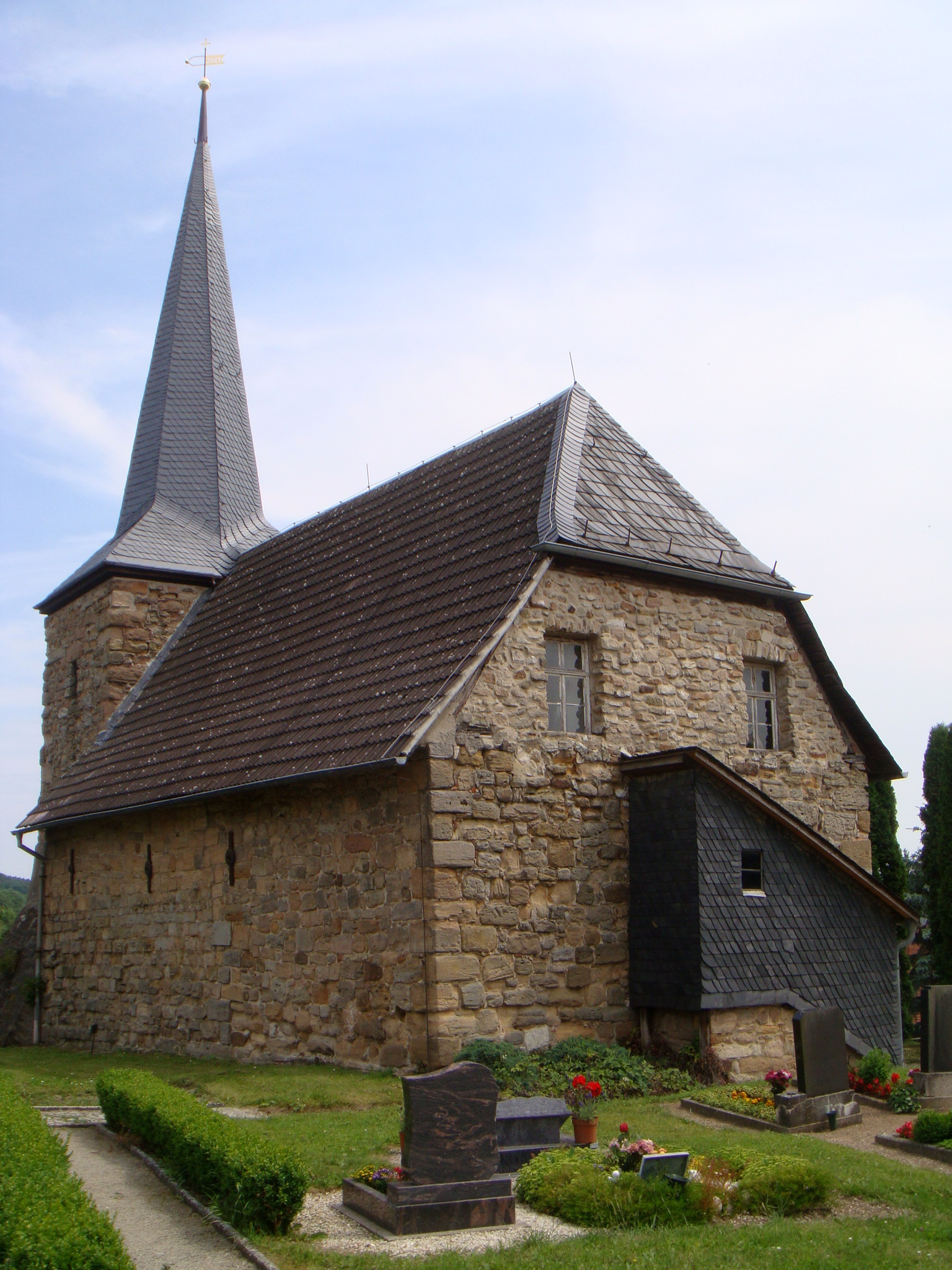 Evanngelische St.-Laurentius-Kirche Burgwenden